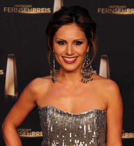 Nazan Eckes beim Deutschen Fernsehpreis 2012